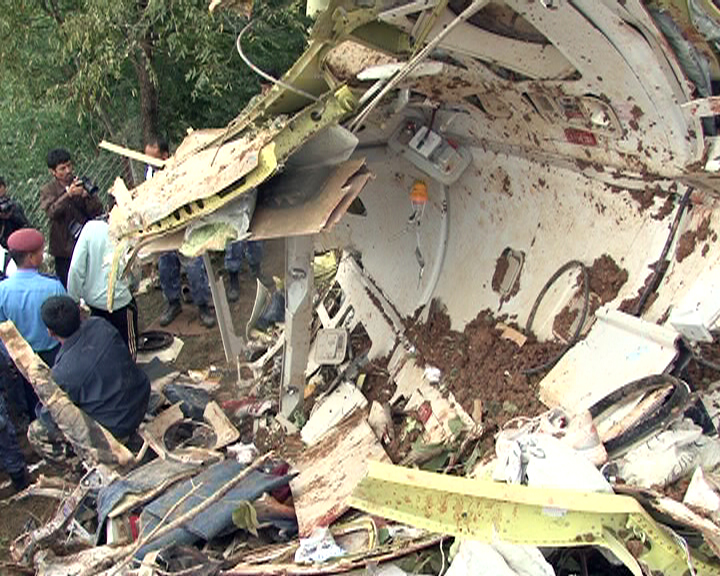 नेपाली: बुद्ध एअर दुर्घटना